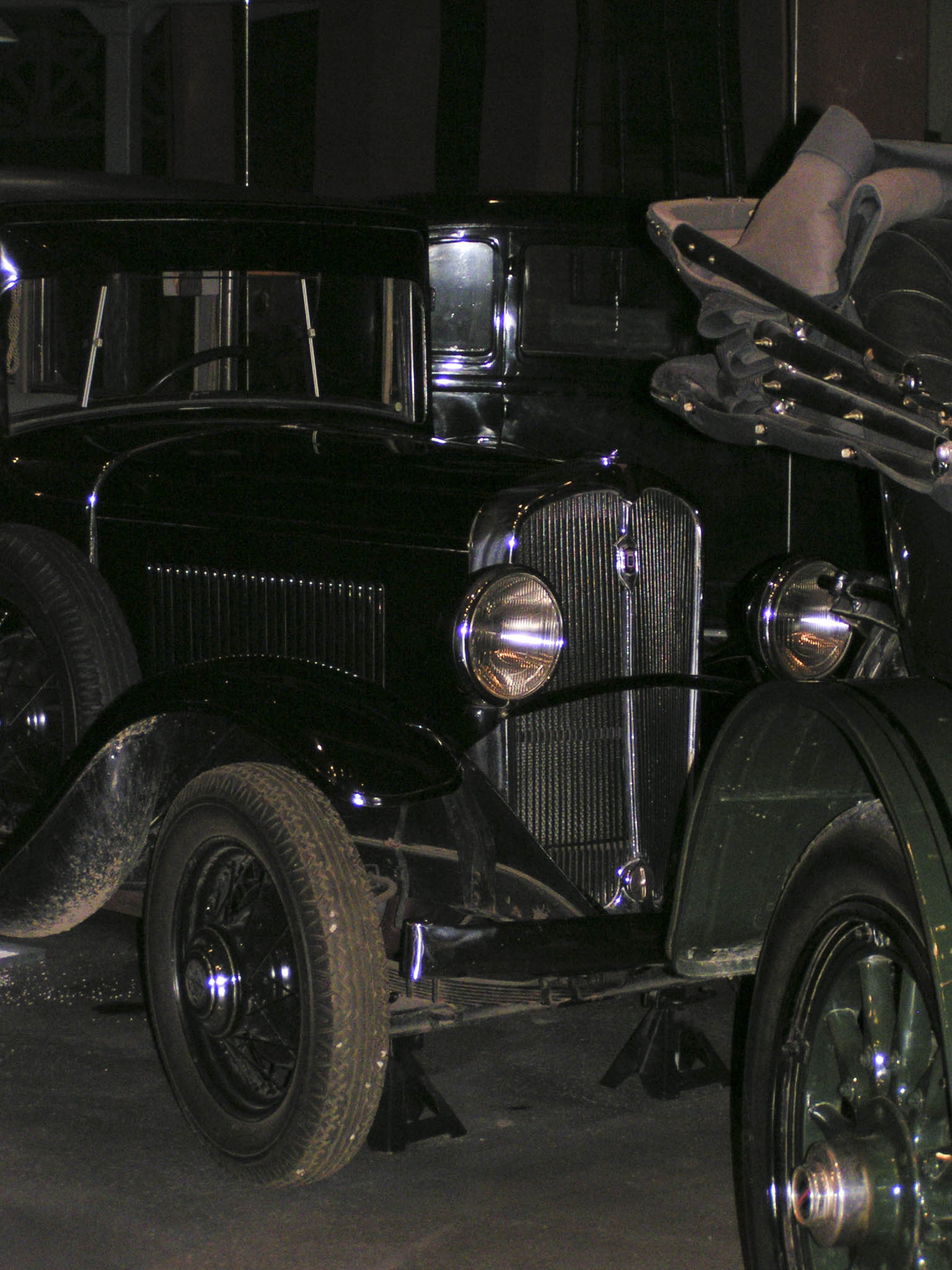 Canadian 1932 Frontenac Deluxe Sedan